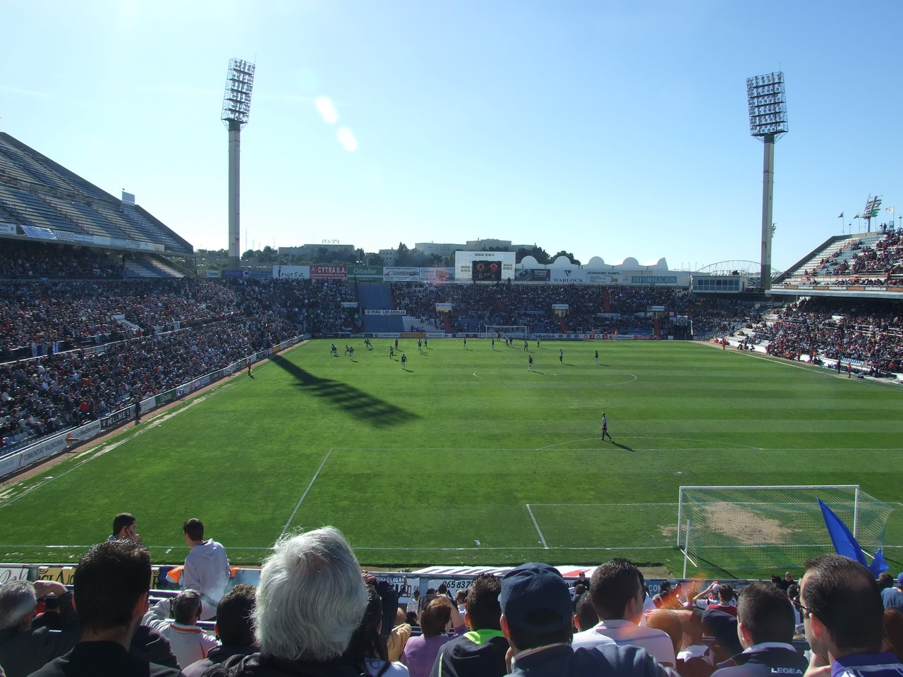 Estadio José Rico Pérez durante el último derby Hércules-Elche, el 13 de enero de 2008